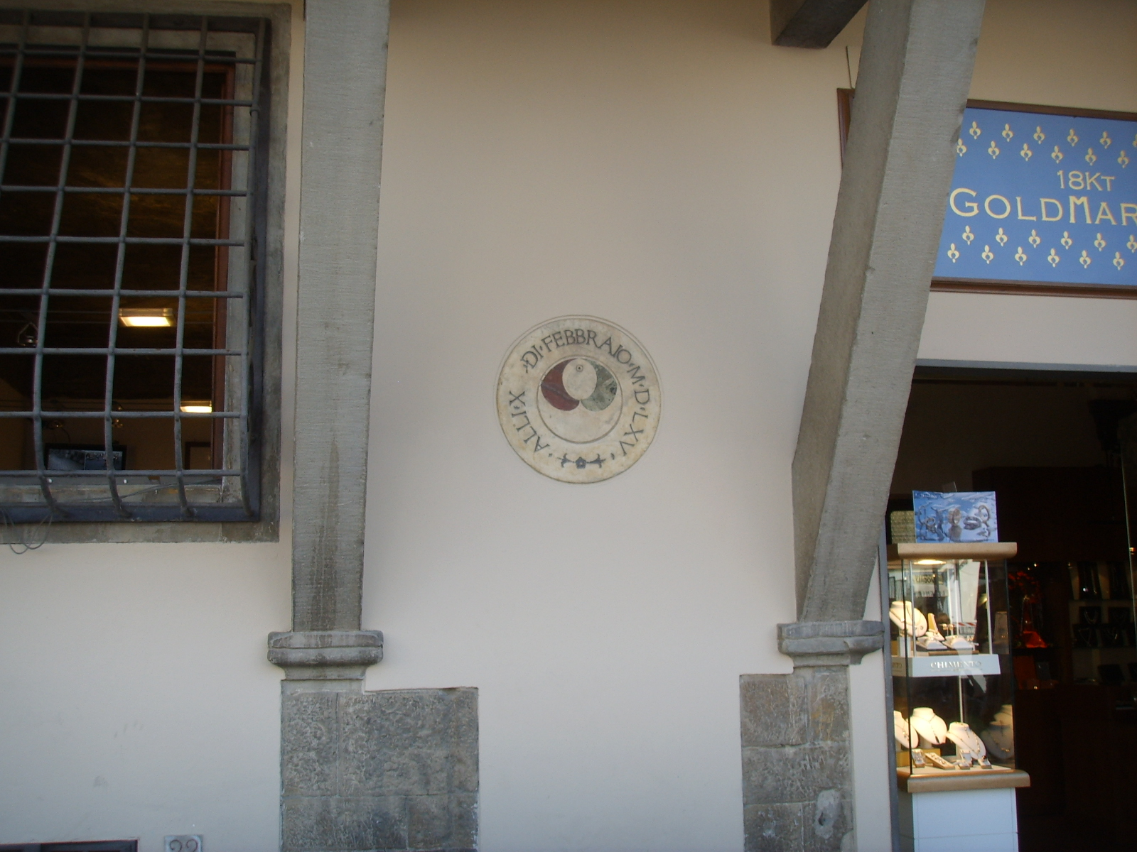 Piazza santa Croce a Firenze: divisorio del campo di calcio fiorentino, datato 1565.